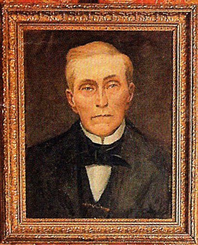 Coronel Juan Galo de Leguizamón. Óleo sobre tela de autor anónimo.